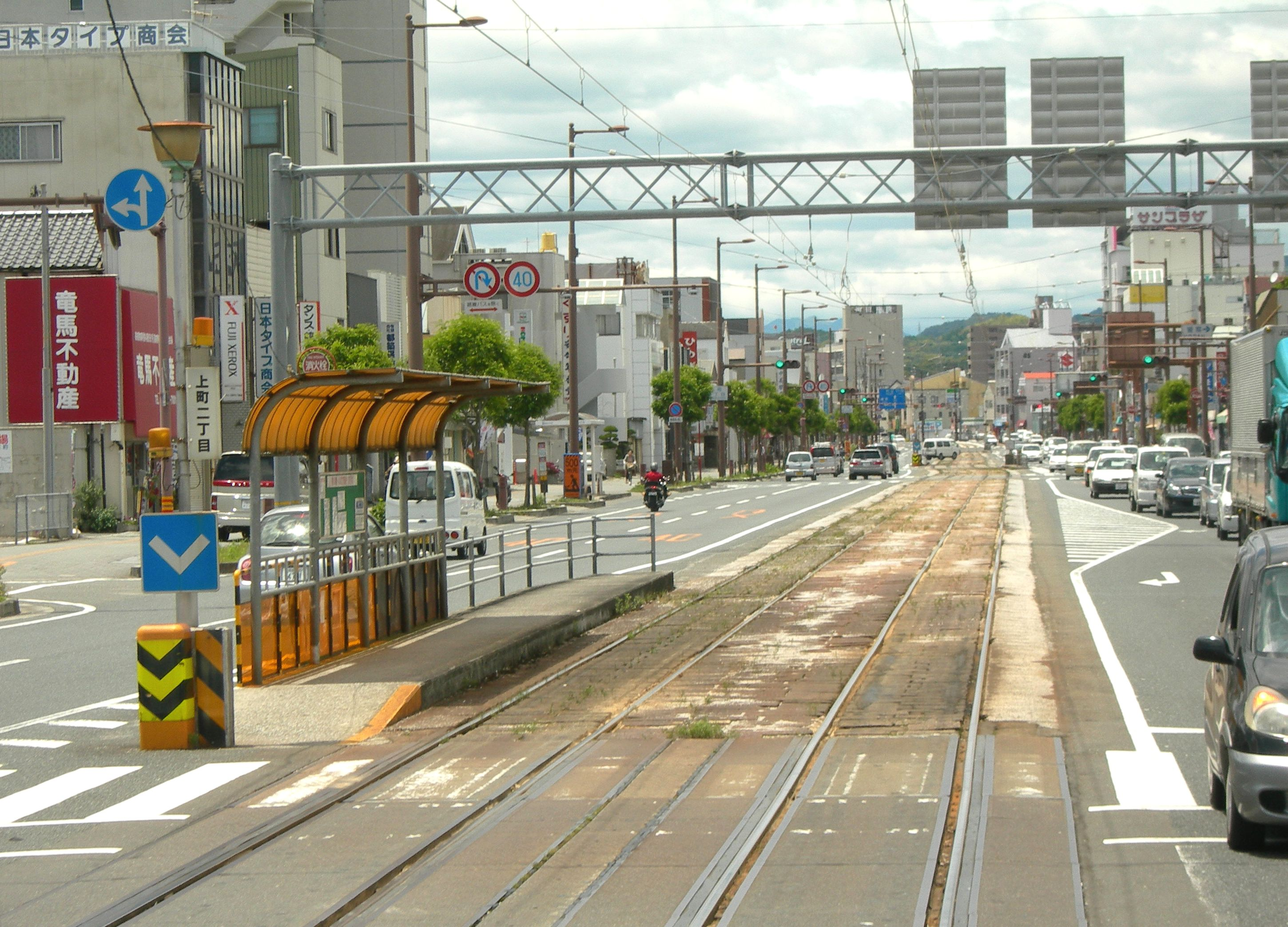 土佐電気鉄道・上町二丁目電停